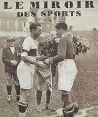 Une du magazine Miroir des Sports montrant la rencontre entre l'Olympique lillois (football) et le SC Fives en 1934